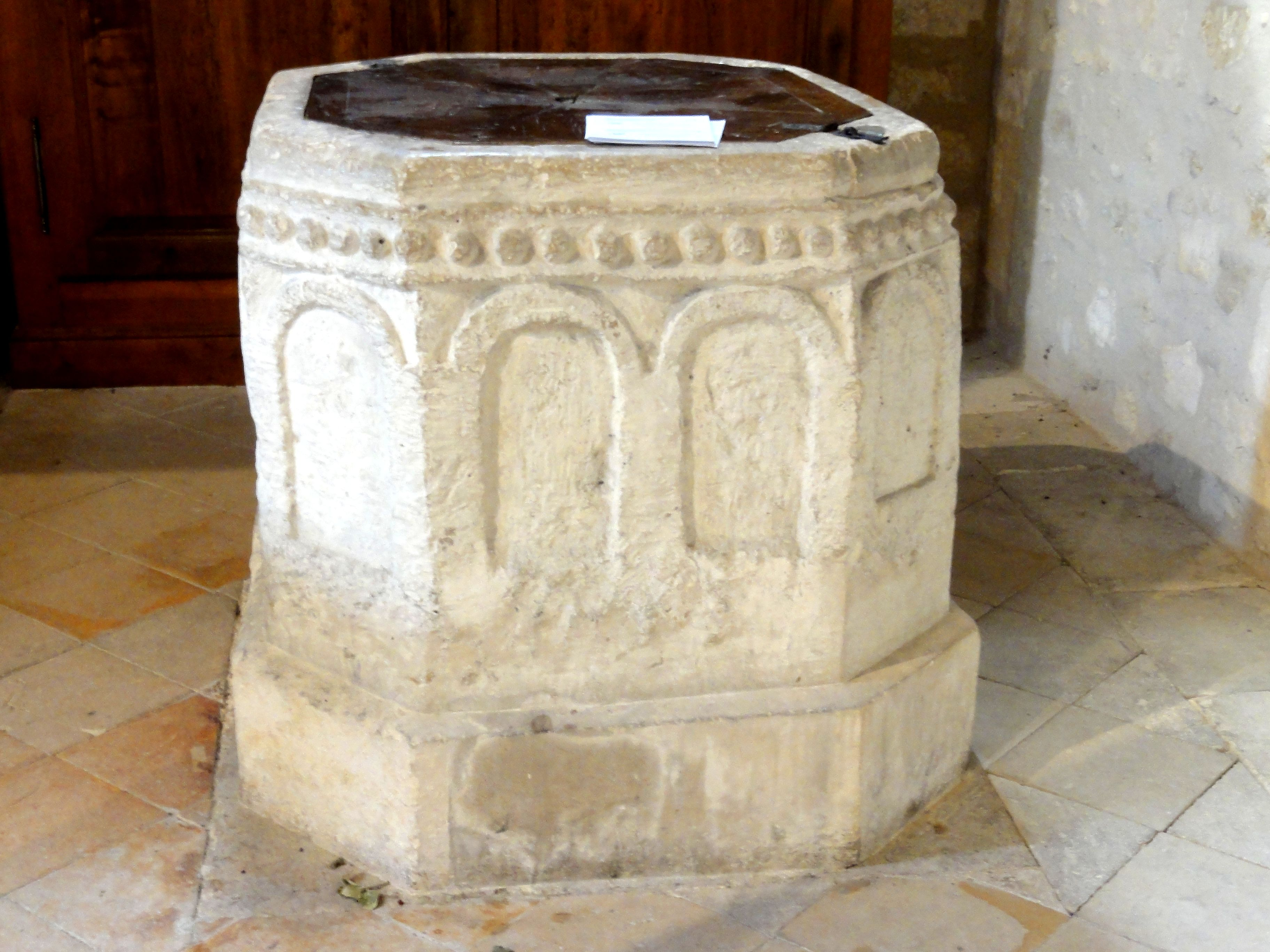 Fonts baptismaux.